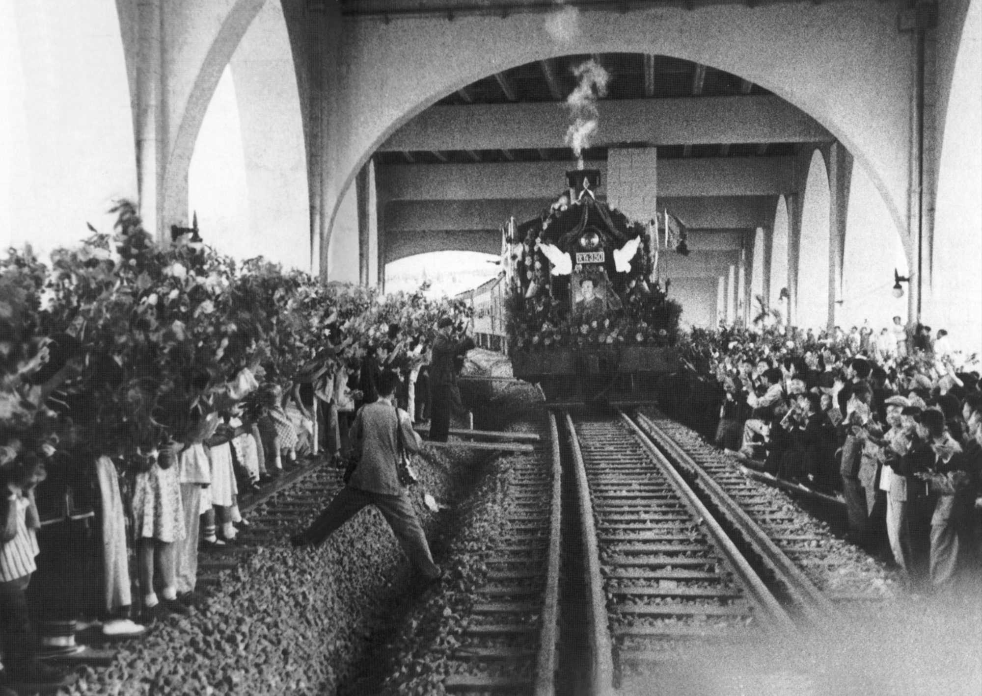 1957年10月15日武汉长江大桥正式通车